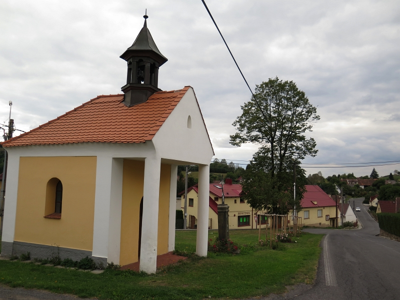 Kaplička, náves, Myslovice.